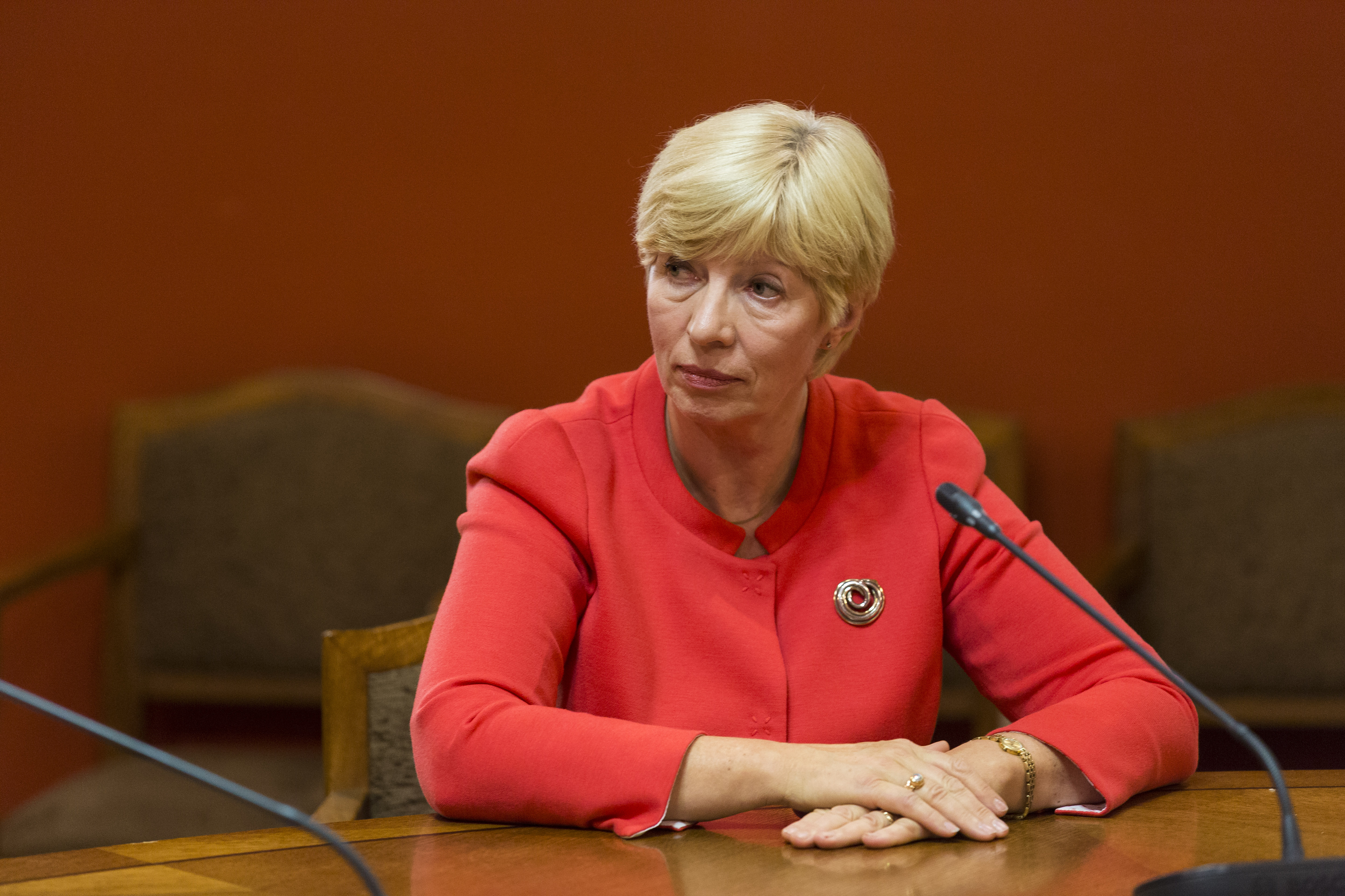 2015.gada 14.septembris. Saeimas Prezidija sēde. Foto: Reinis Inkēns, Saeimas Kanceleja Izmantošanas noteikumi: saeima.lv/lv/autortiesibas